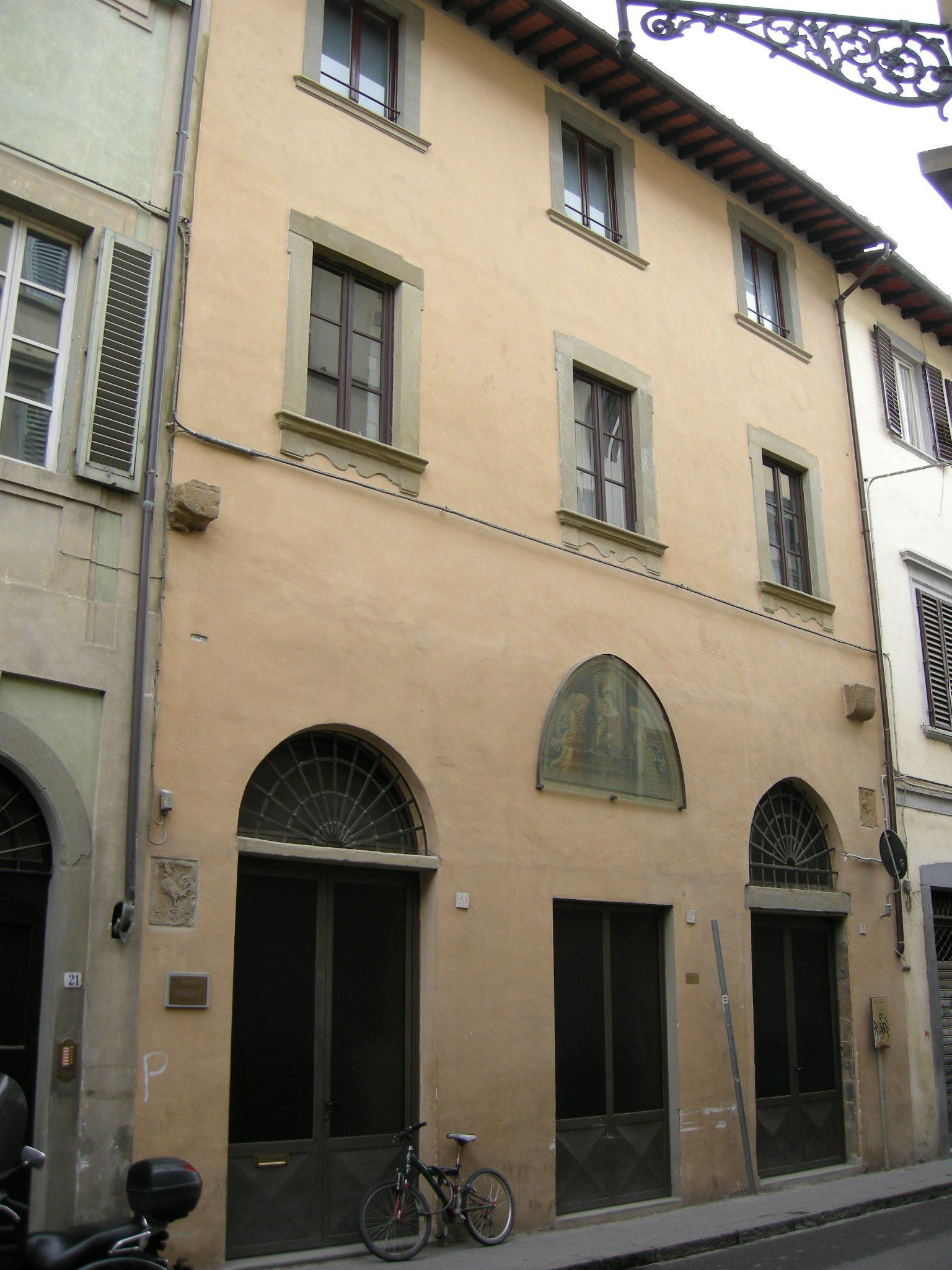 Ospizio di San Niccolò (Florence)